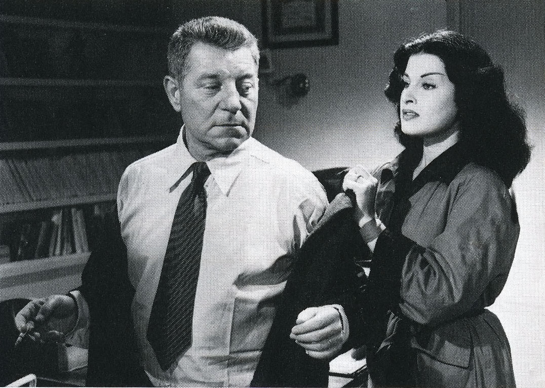 Bufere film de Guido Brignone (1952)